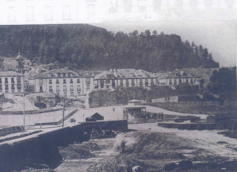 Hotela bista orokorra